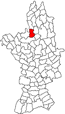 Categorie:Hărţi ale judeţului Olt